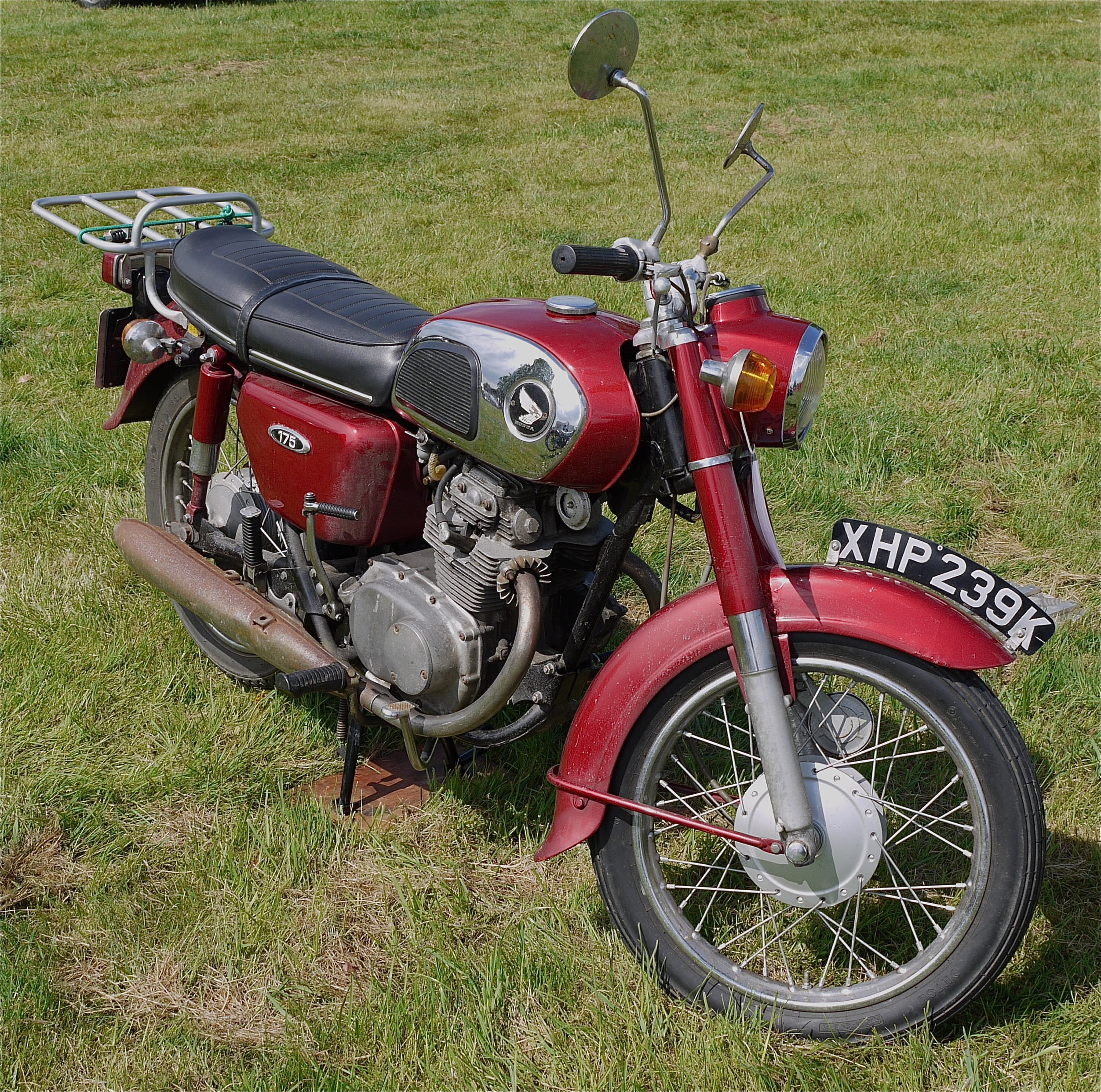 Panasonic G1 14-45 Lens